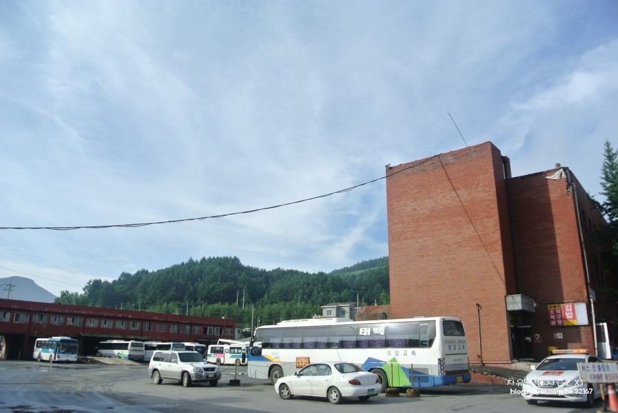 태백시외버스터미널 전경.